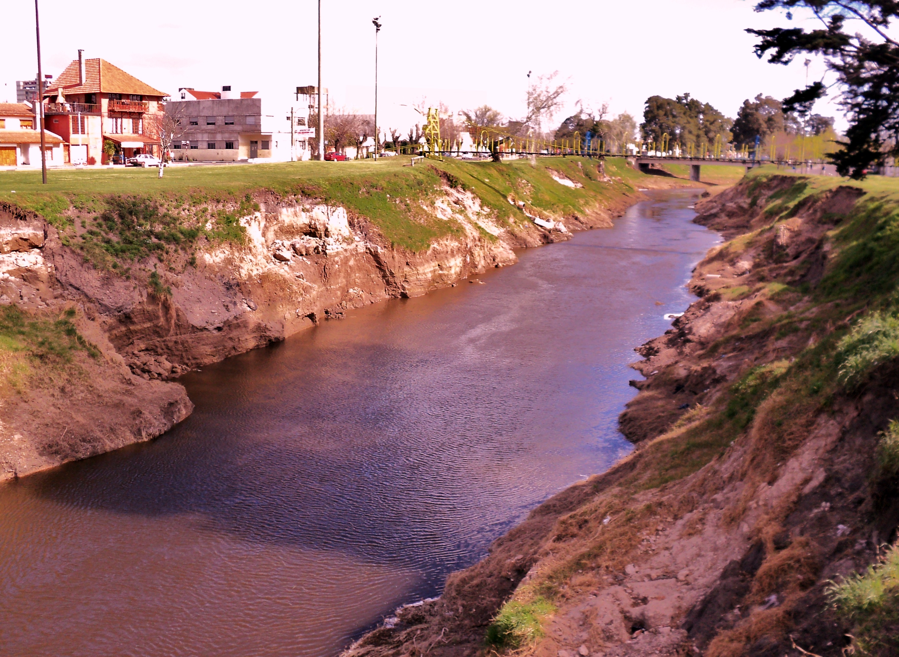 El Arroyo Tapalque atravesando la ciudad de olavarria